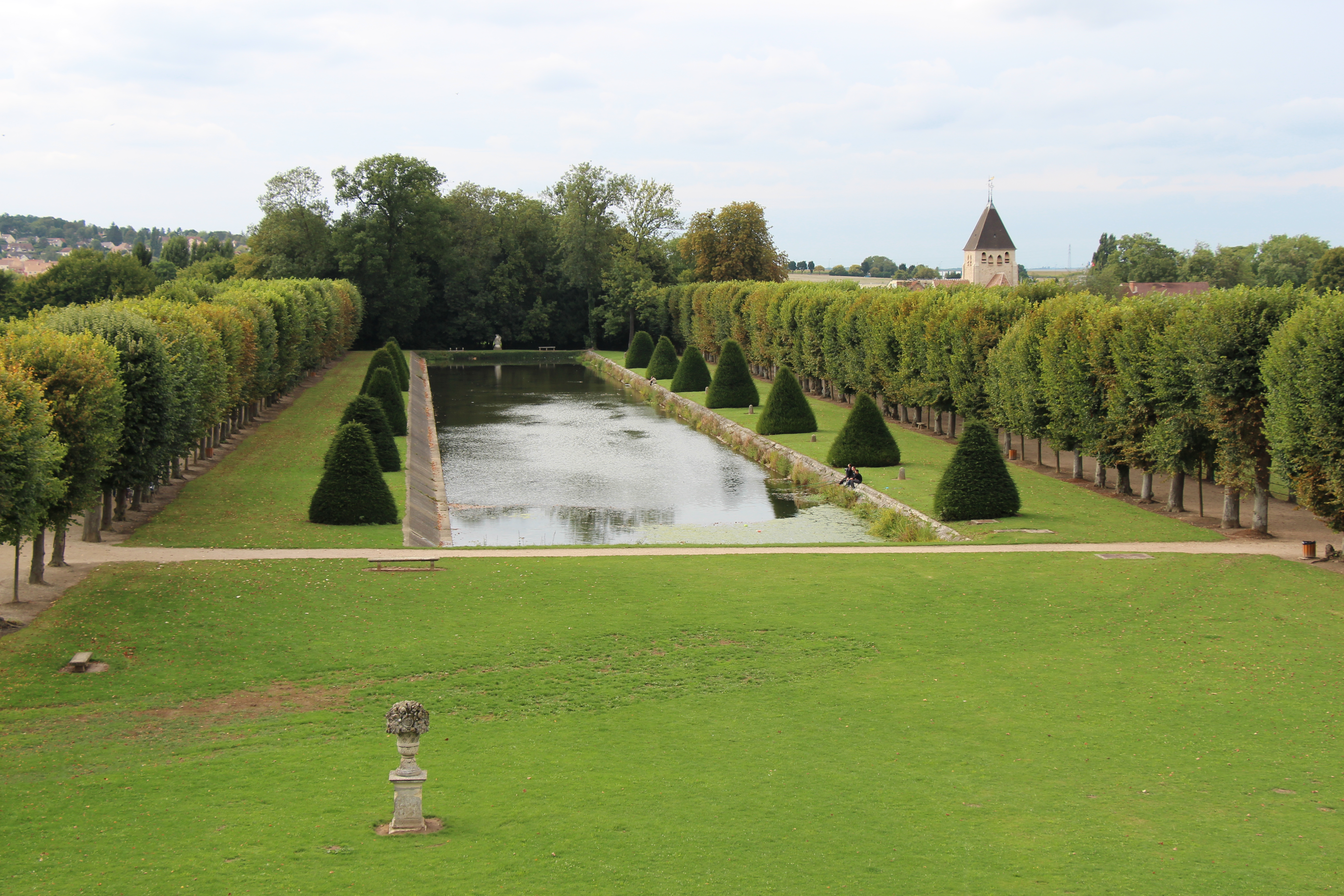 La pièce d'eau du château de Plaisir, vue depuis le château. .